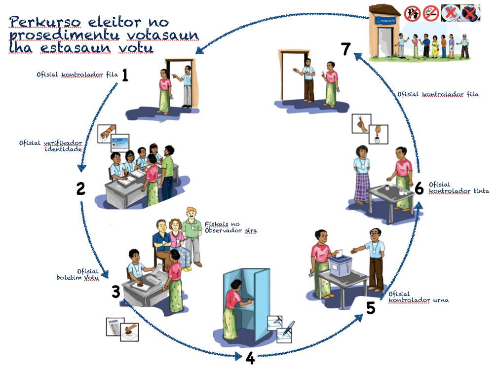 Wählerinformation für die Parlamentswahlen in Osttimor 2018